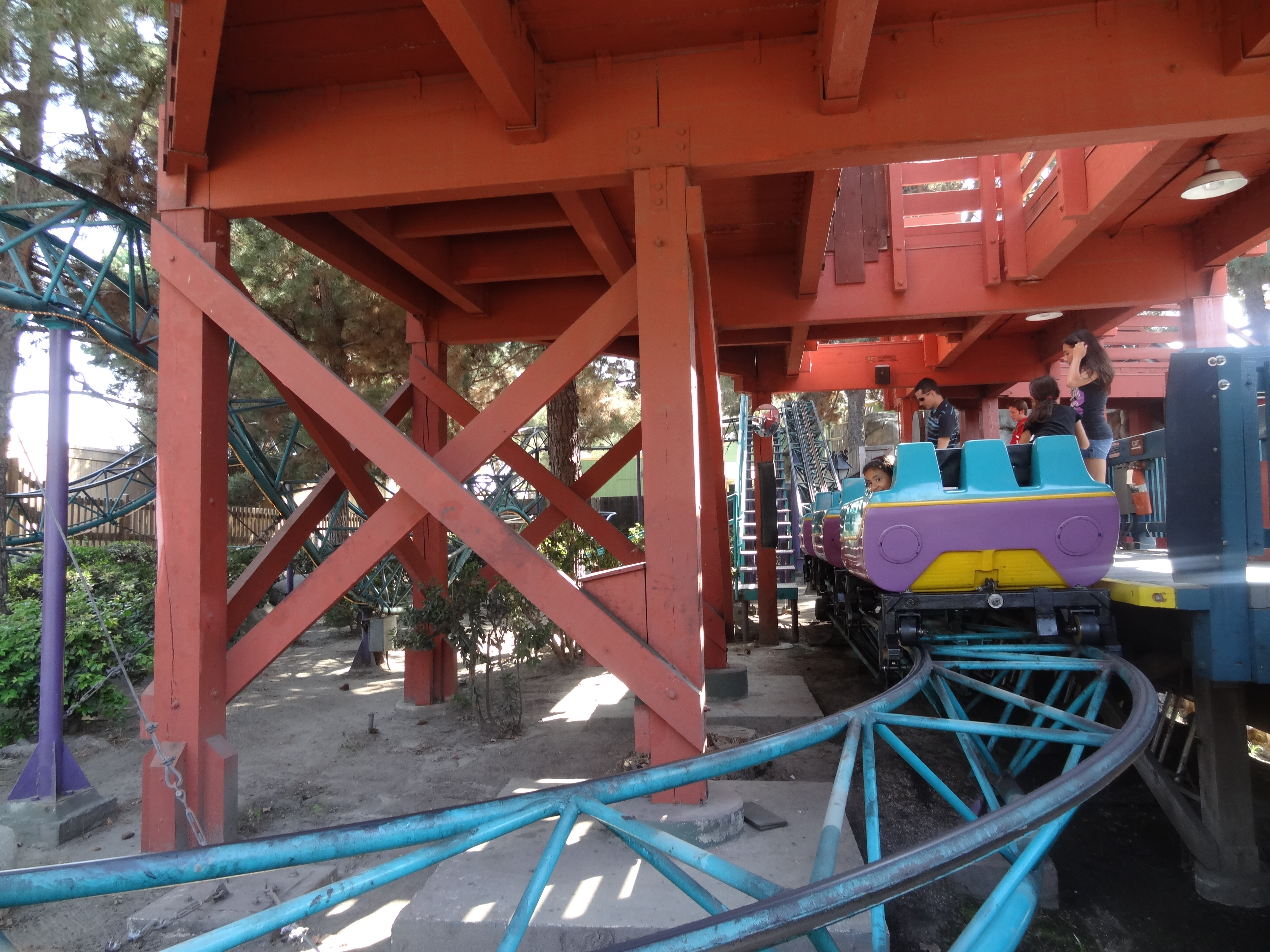 Montagnes russes Timberline Twister à Knott's Berry Farm.